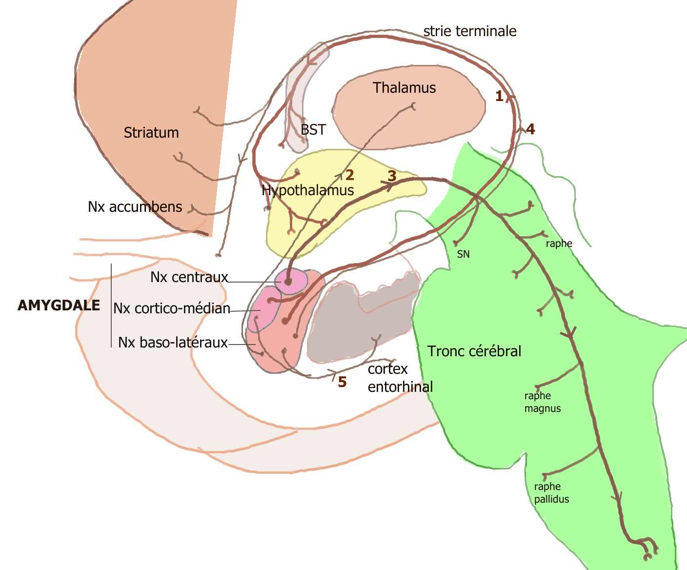 Efférences de l'amygdale, d'après Nieuwenhuys et al The Human CNS Springer